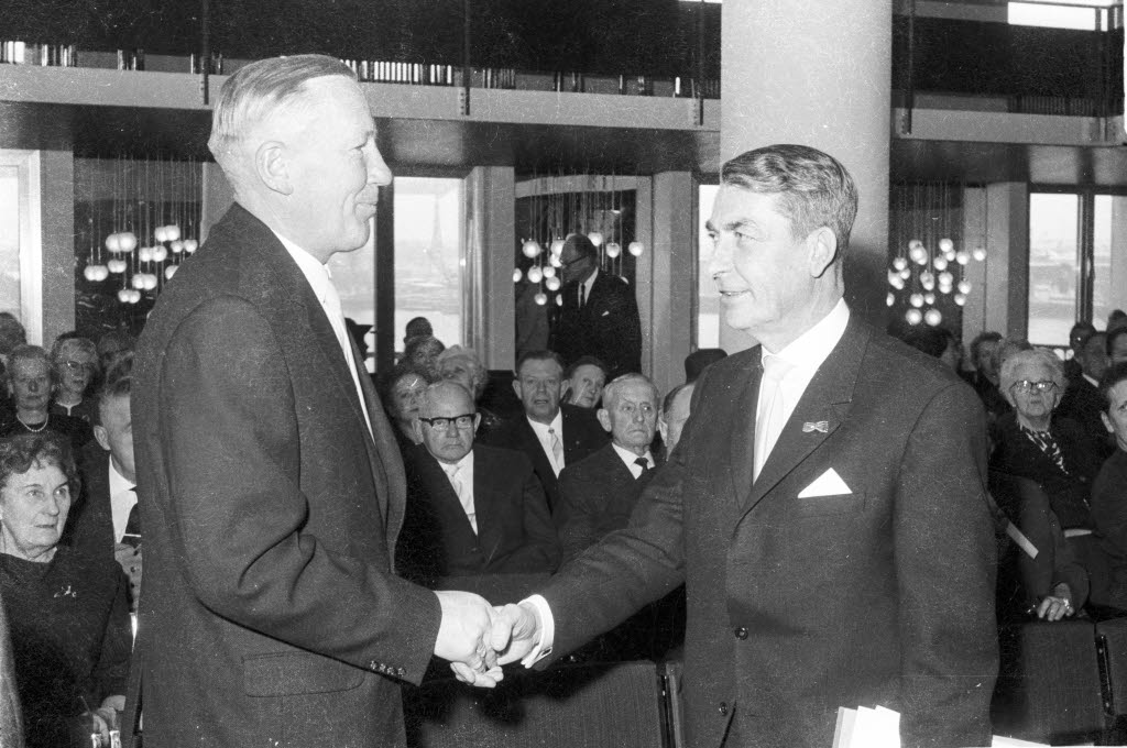 im Schloss. Im Bild Kultusminister Claus Joachim von Heydebreck (rechts) gratuliert dem niederdeutschen Dichter Hinrich Kruse (links) zur Auszeichnung.